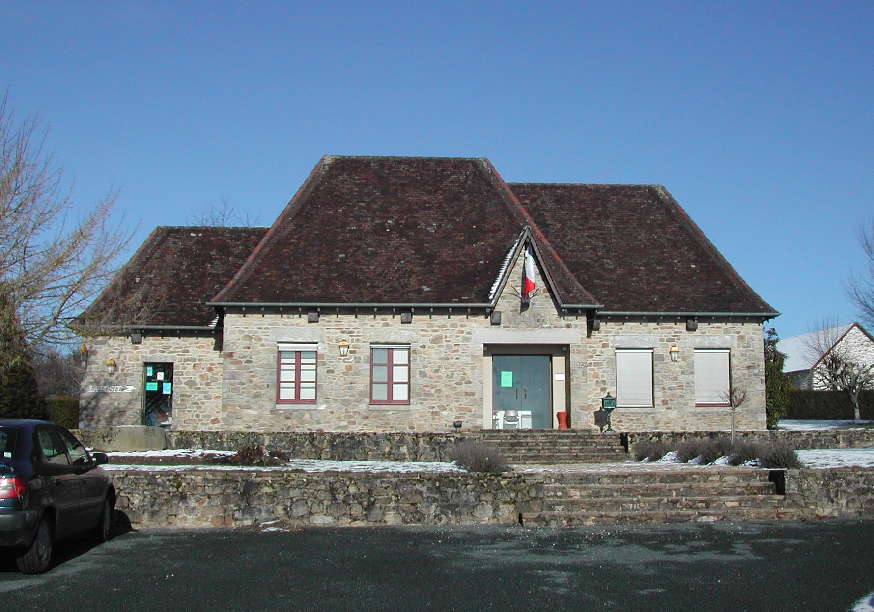 Photo de la mairie du Chalard, prise le 31 janvier 2010, sous un peu de neige.